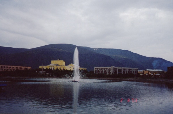 Кировск, центр города. Фонтан на Верхнем озере.